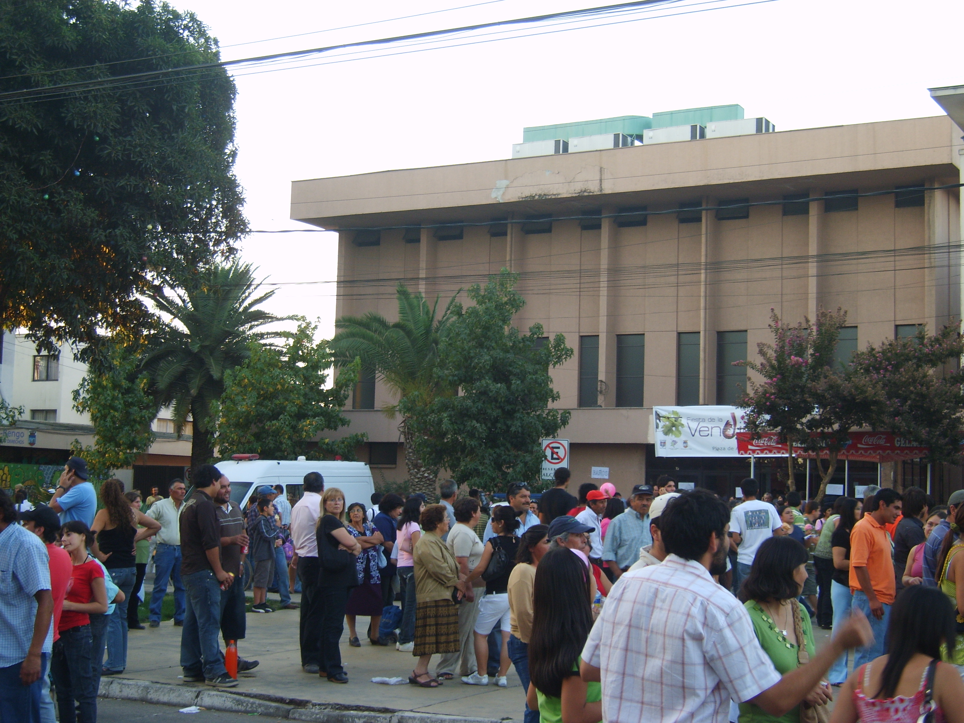 Exterior del Teatro Municipal de Rengo, Chile